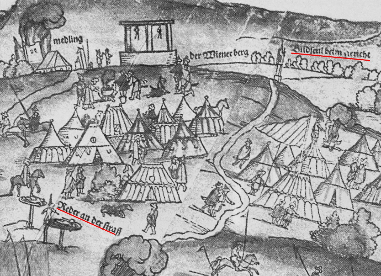 Ausschnitt der Rundansicht Wiens bei der 1. Türkenbelagerung (erstellt 1529)